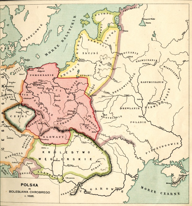 Państwo Bolesława Chrobrego z "Atlasu do dziejów Polski" E. Niewiadomskiego z 1898 roku.